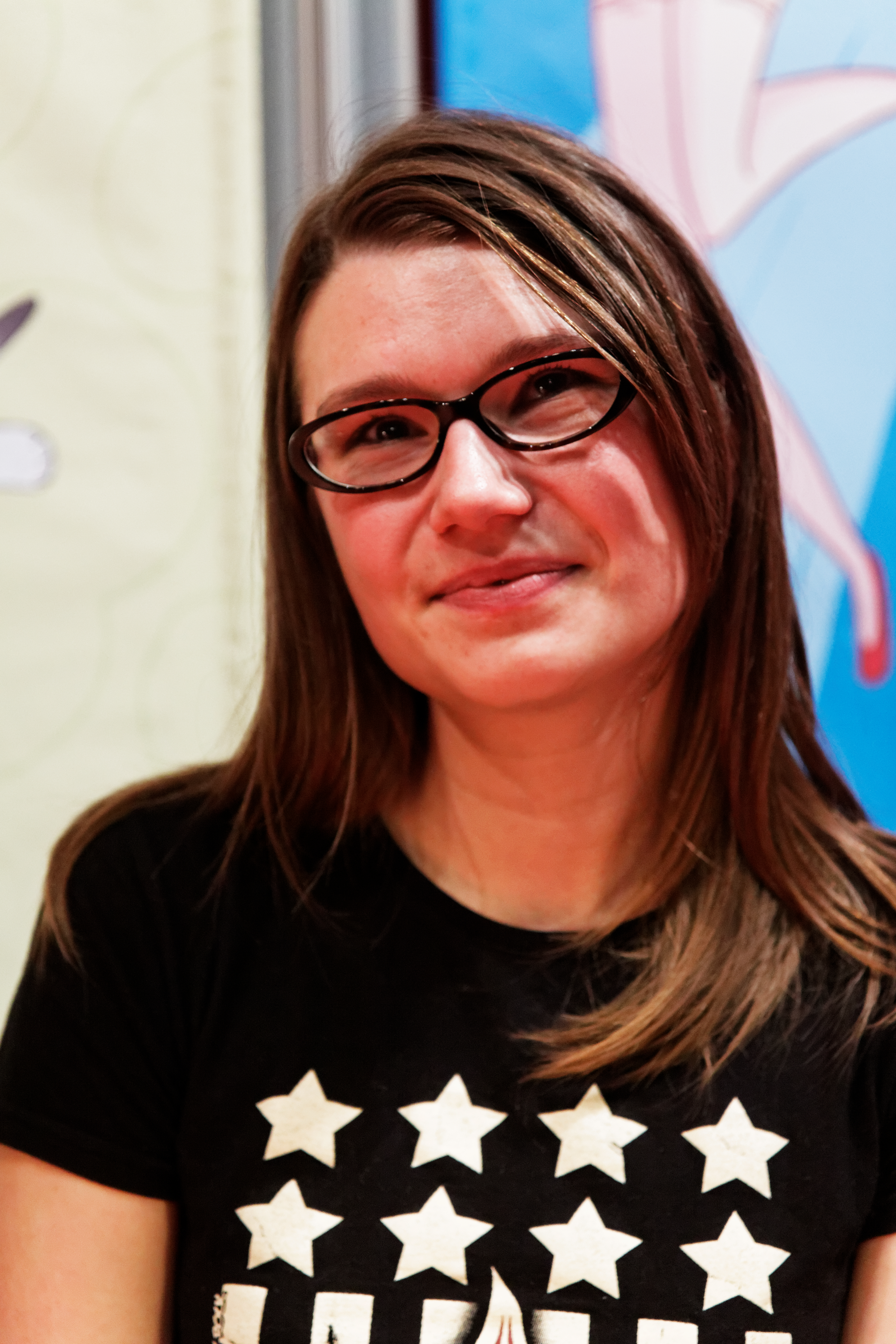 Clotilde Bruneau en dédicace au salon du livre jeunesse 2012 de Montreuil.